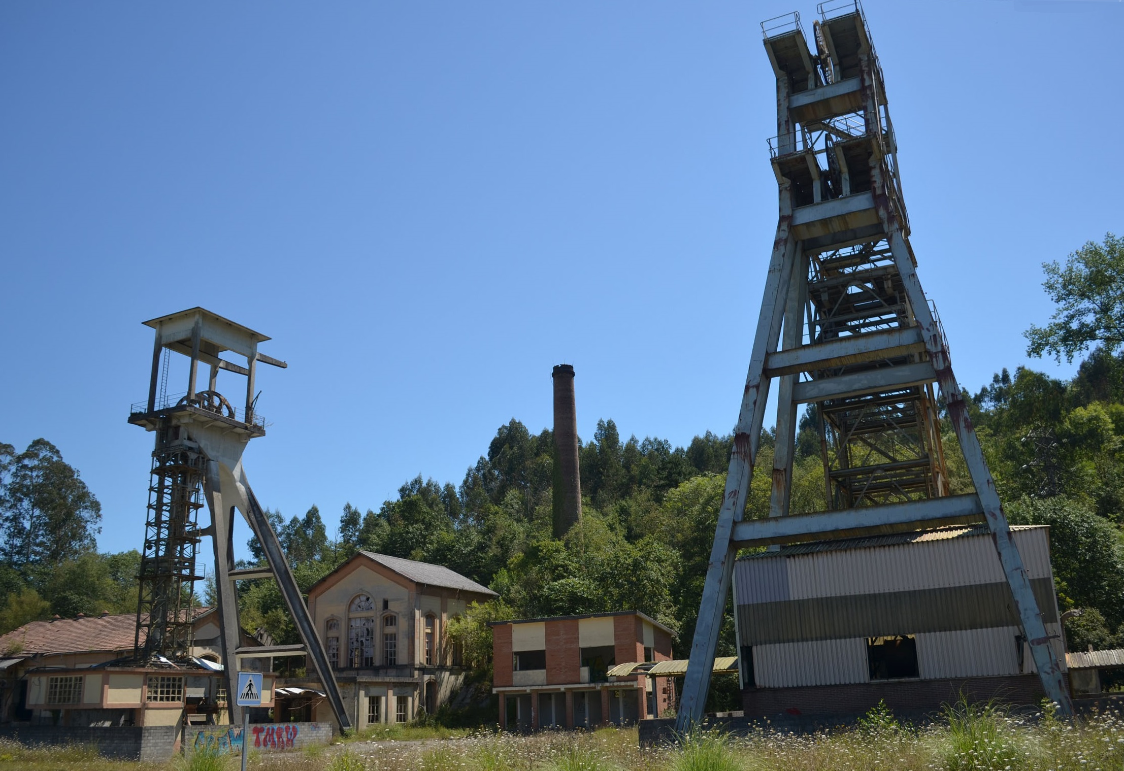 Antiguas minas de Lieres en Siero, Asturias